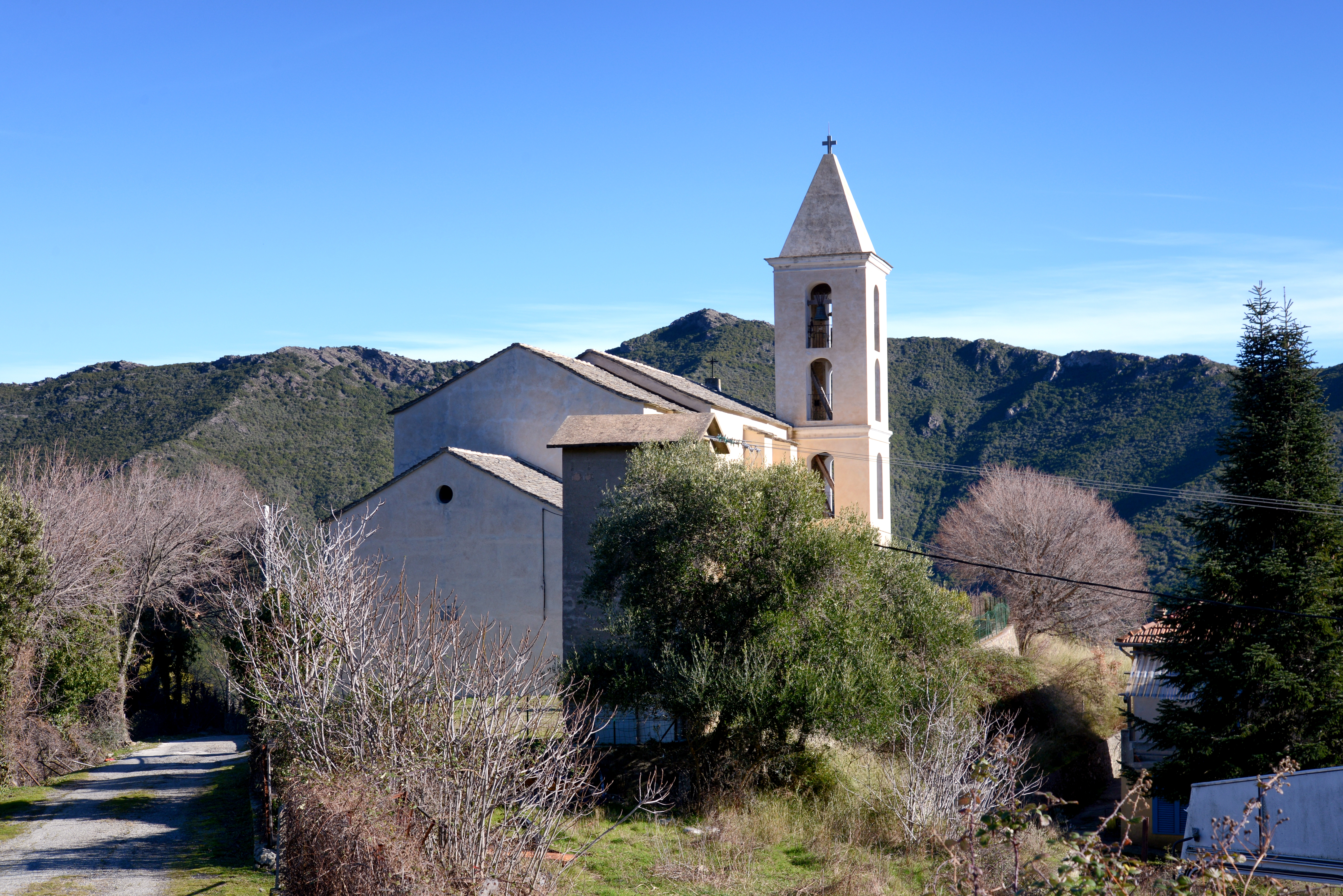 Noceta, Centre Corse - Église Saint-Paul, d'origine romane, remaniée aux XVIIe et XVIIIe siècles.